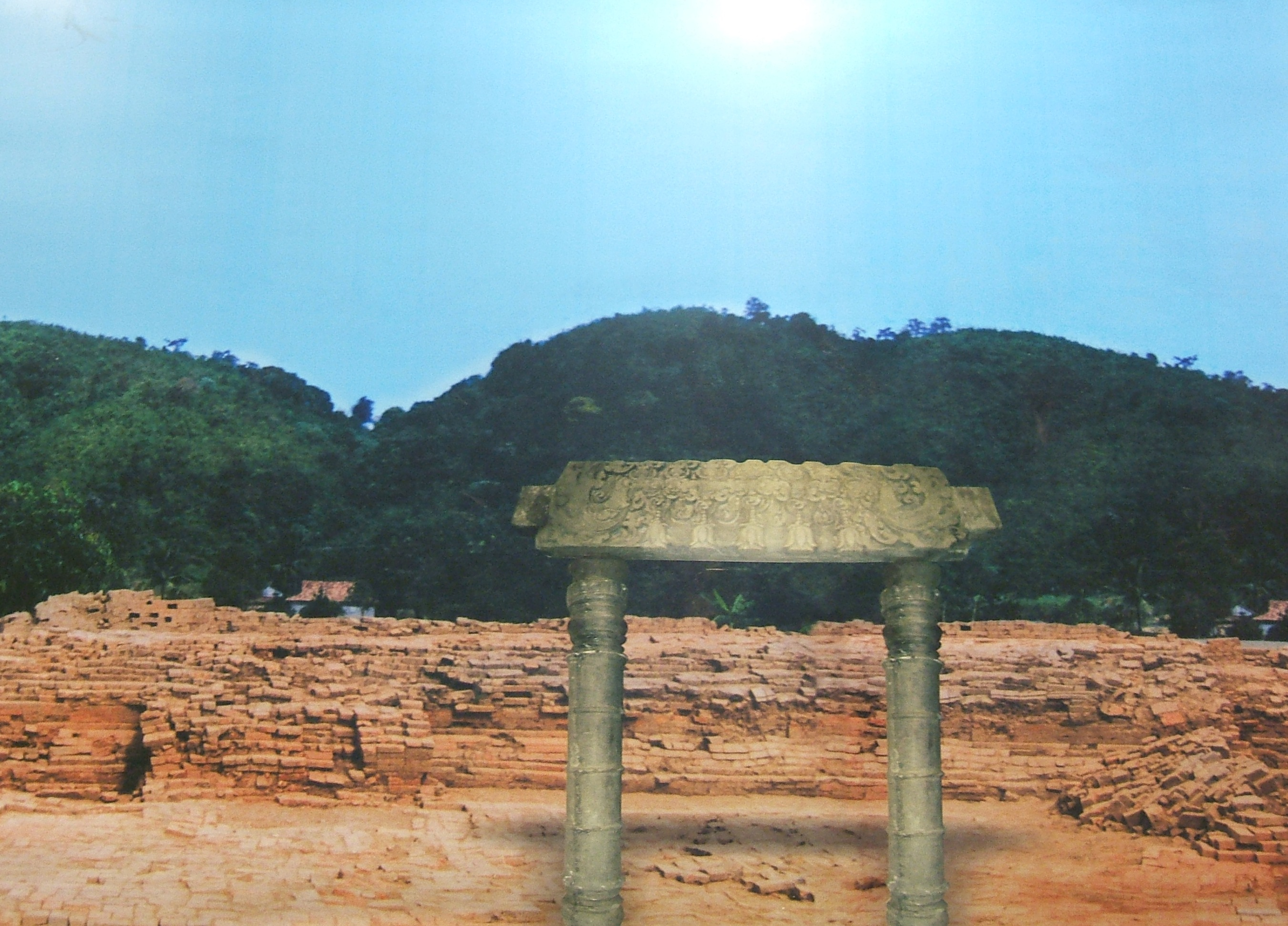 Khương Việt Hà chụp lại tại Viện Bảo tàng Lịch sử Việt Nam ngày 21 tháng 10 năm 2007